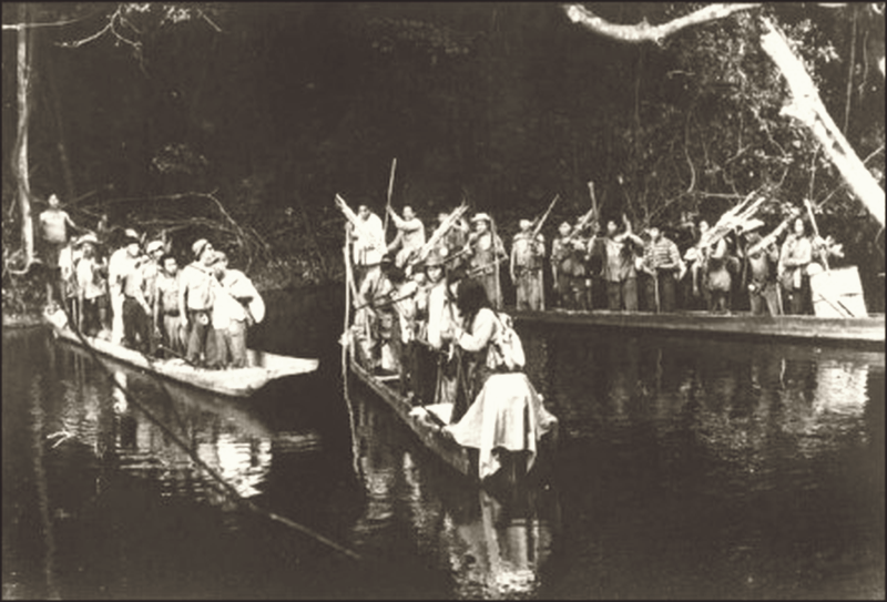 Navegando nos rios amazônicos, em canoas.